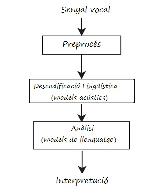 disseny de reconeixemnt parla